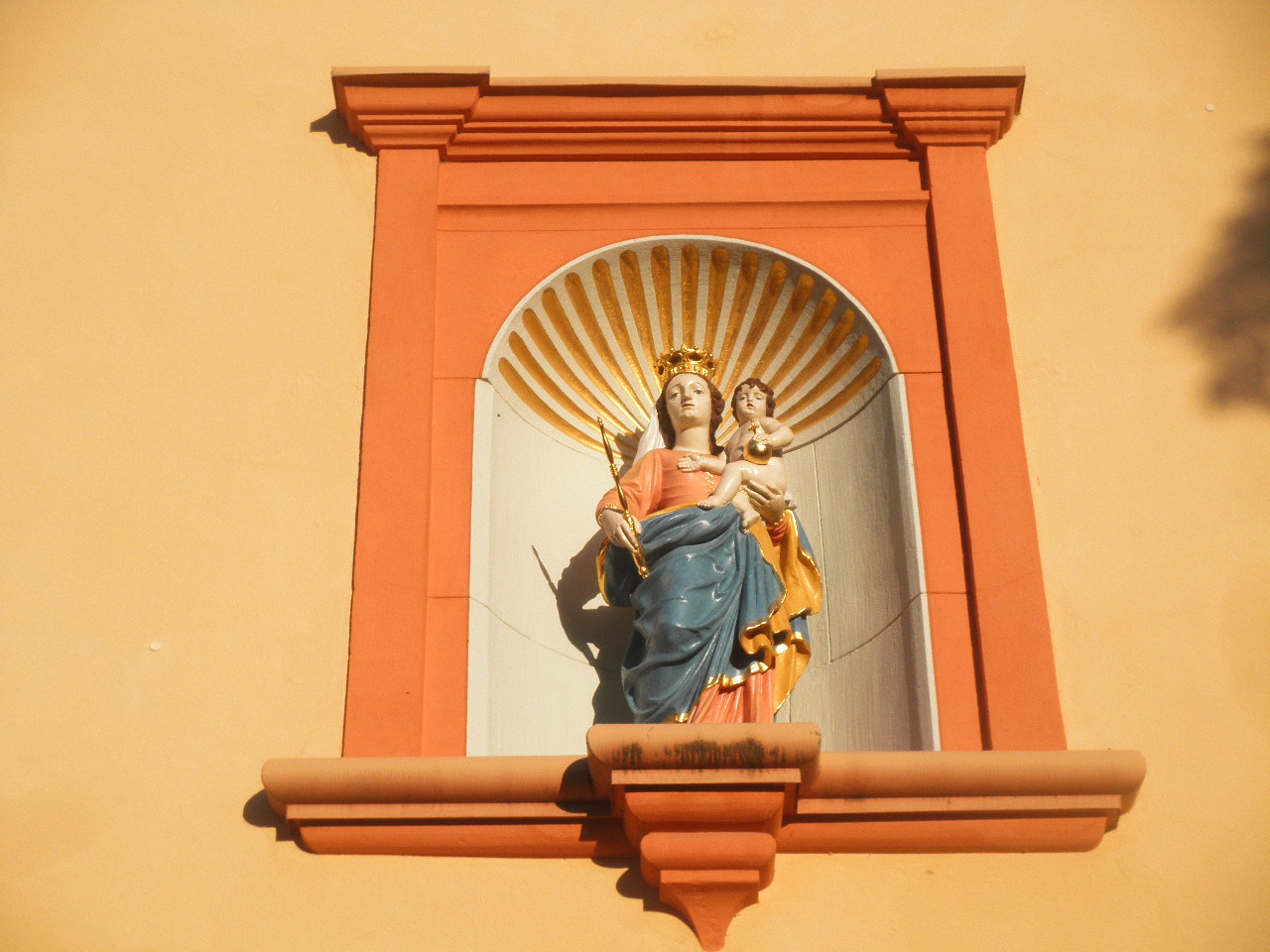 pilgrima kirko de Waghäusel, fasada madono